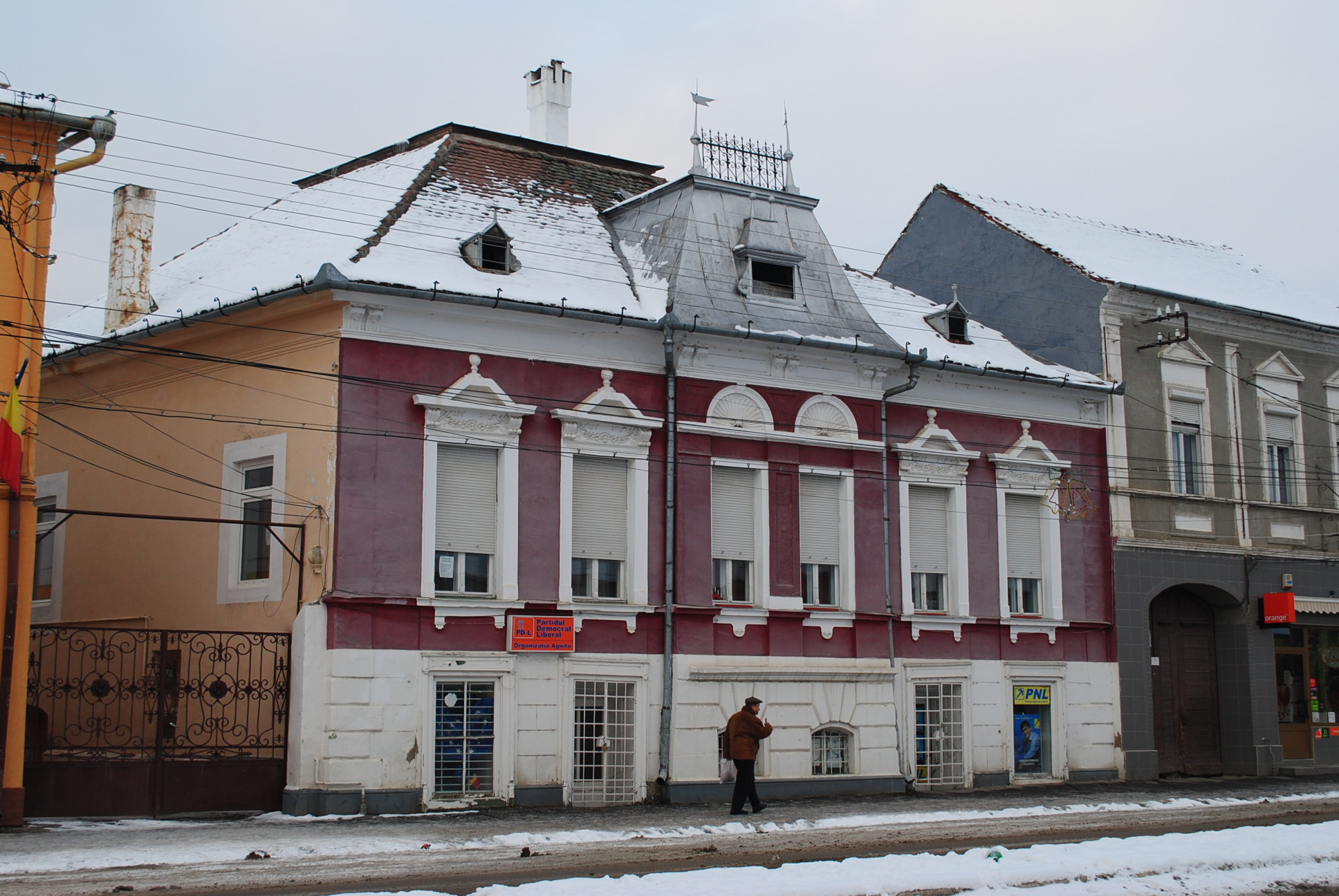 Agnita Centrul istoric, sec. XIV - XX